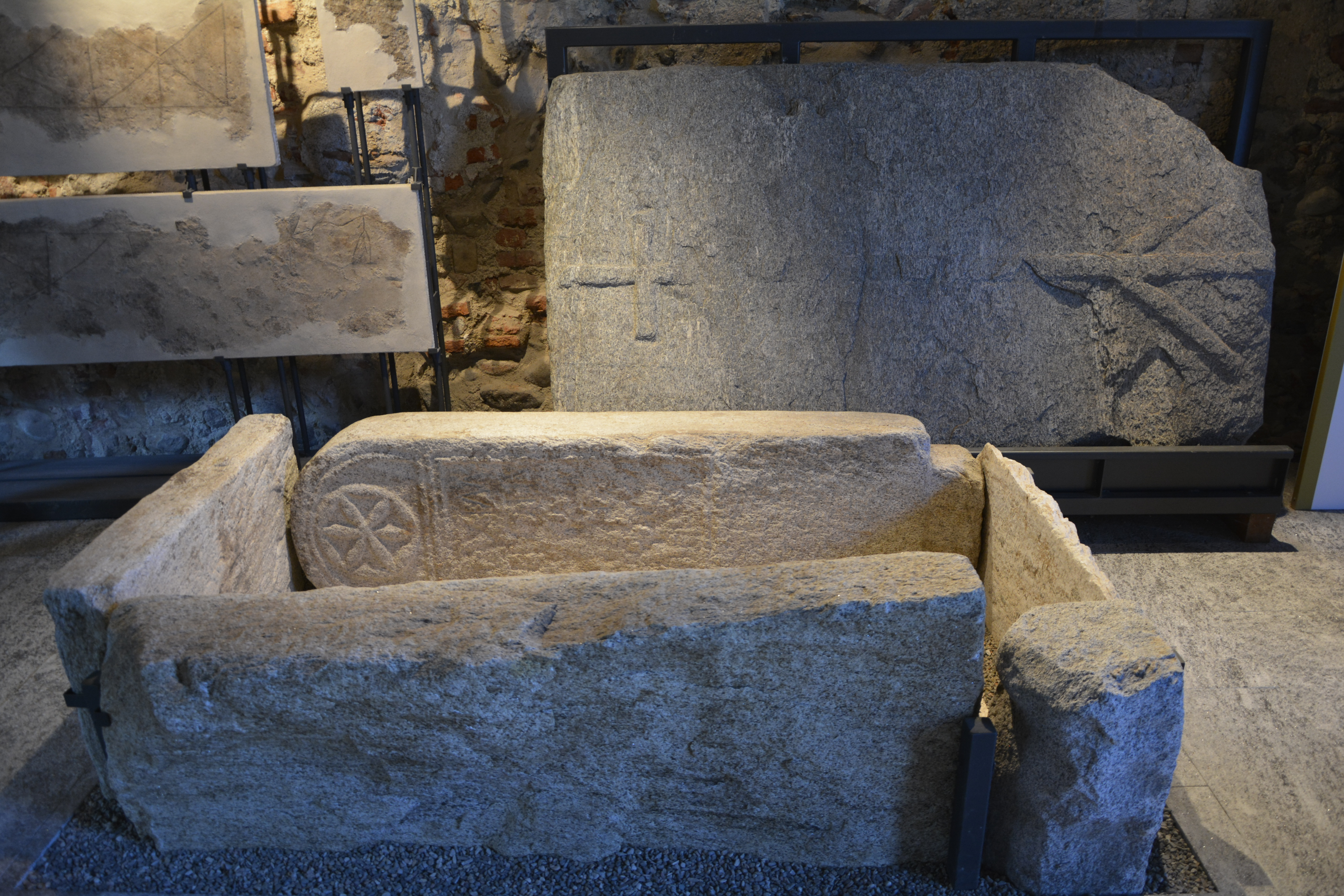 Tomba in pietra con copertura crucifera nel monastero di Cairate, in provincia di Varese.